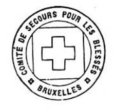 Sigle du Comité de Secours pour les Blessés (de guerre) Bruxelles 1864. Ce Comité est la base de la future Croix-Rouge de Belgique.